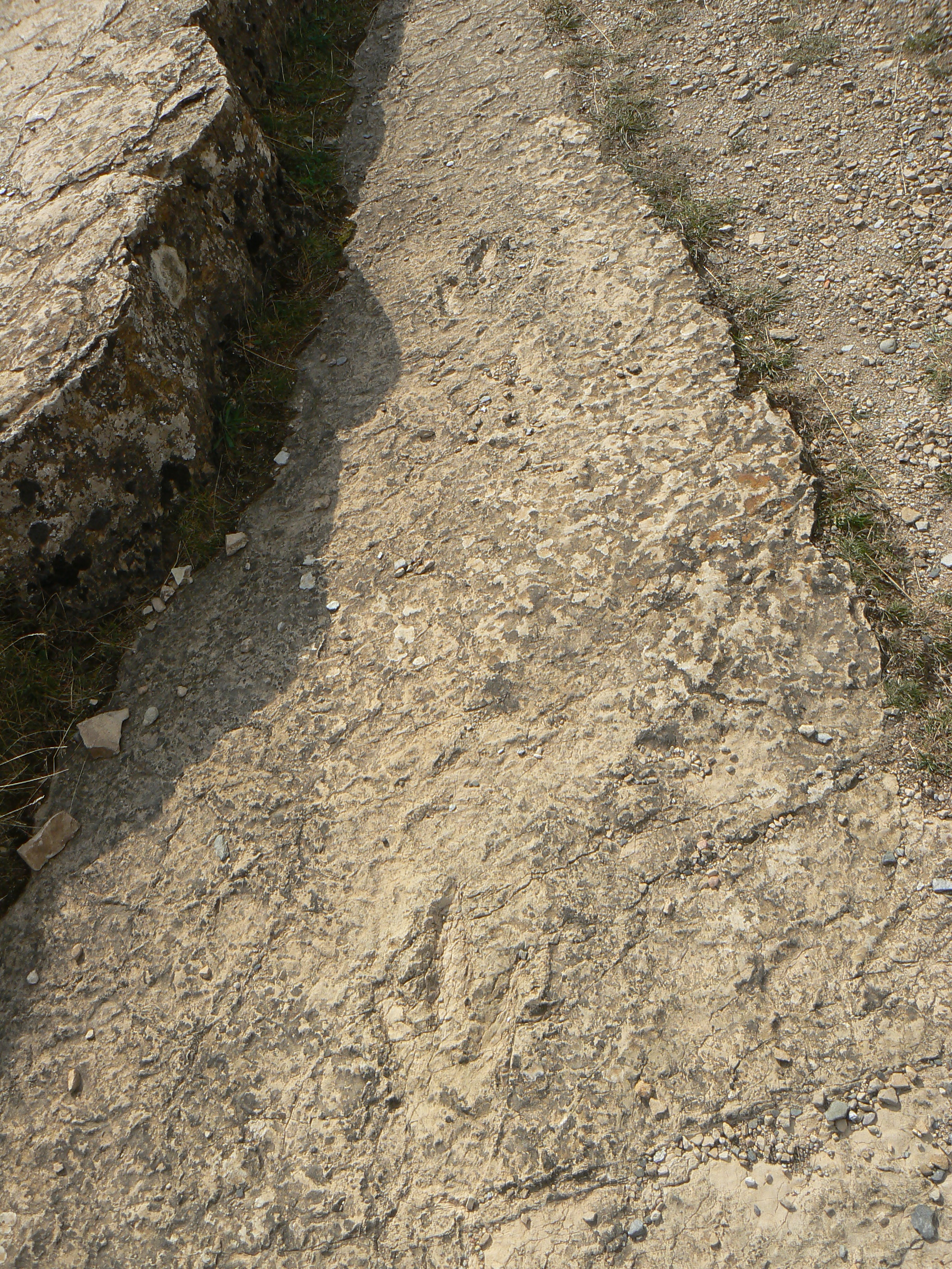 Empreintes de dinosaure (Grallator minusculus) à Saint-Laurent-de-Trèves en Lozère